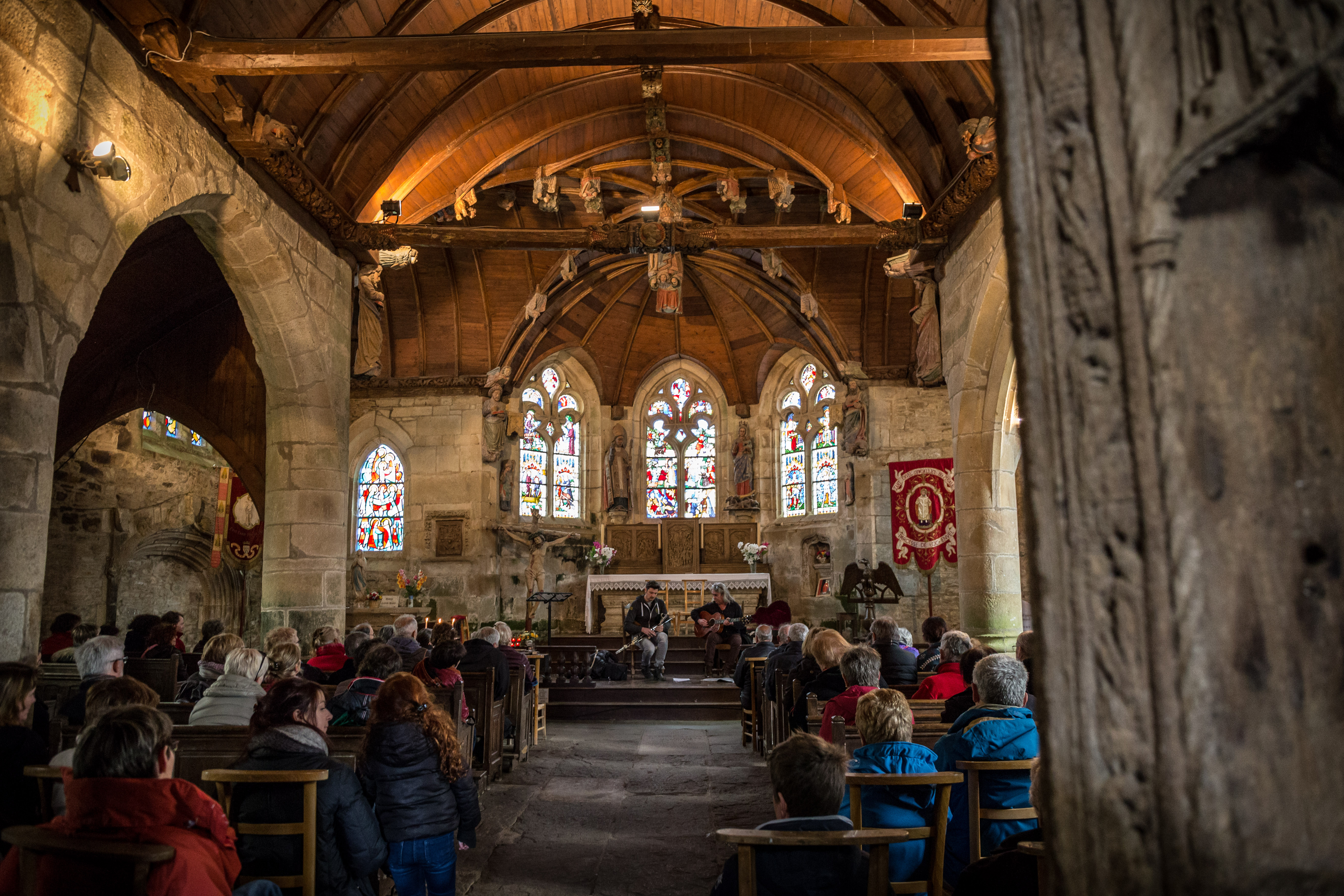 Ronan Le Bars et Nicolas Quemener en concert dans l'église Saint-Envel de Loc-Envel pour la Rando Muco le 24 avril 2016.